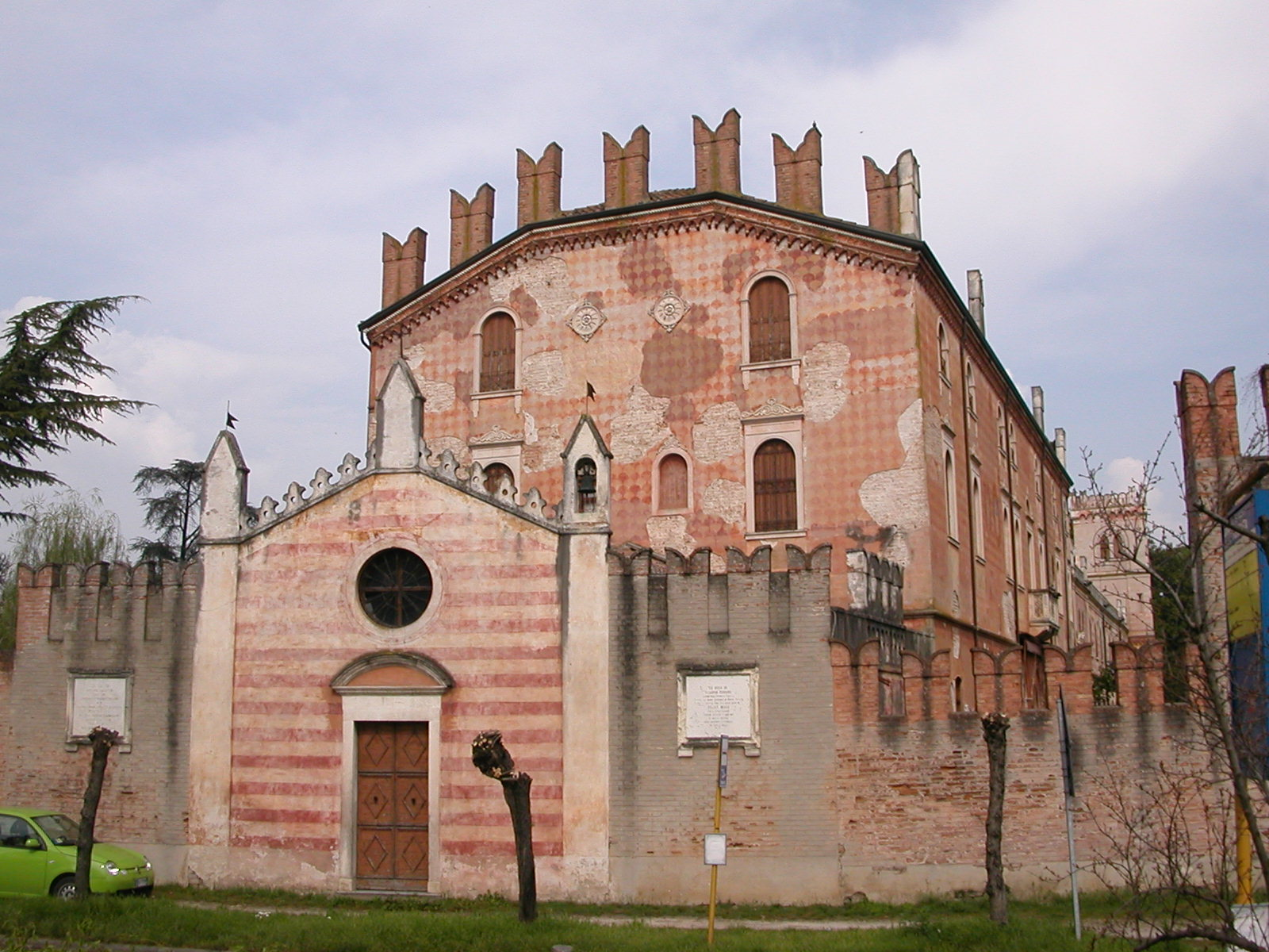 Villa Miari-De Cumani, Sant'Elena, Padova.